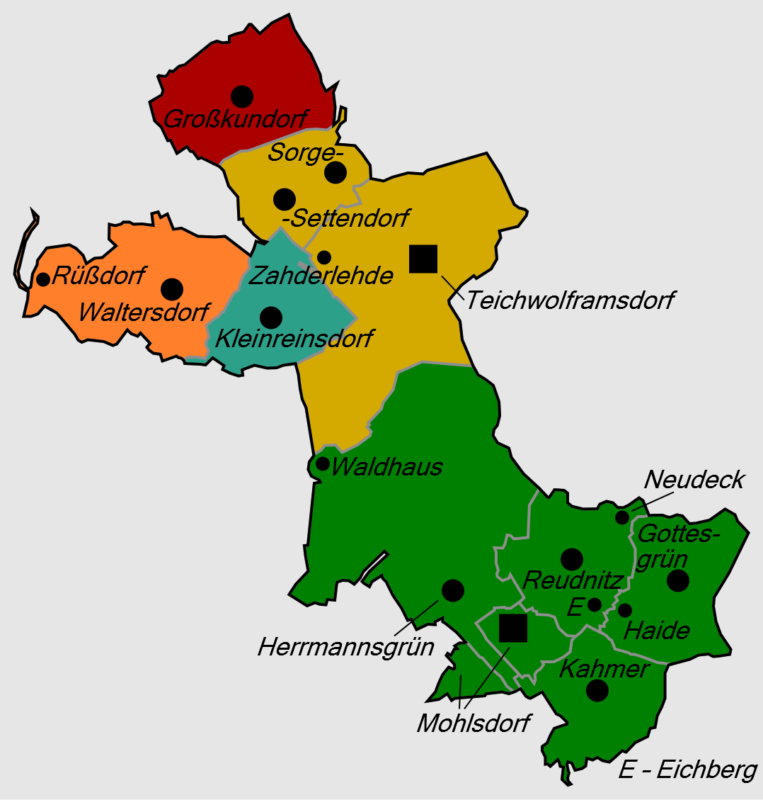 Gliederung der Gemeinde Mohlsdorf-Teichwolframsdorf ab 8. März 1994